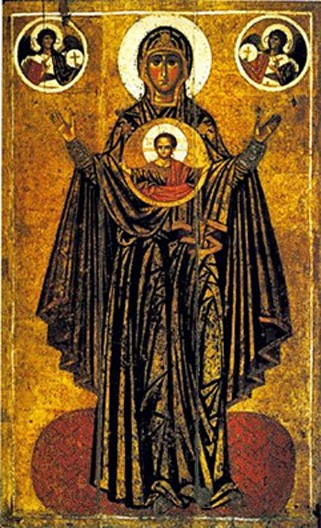 Zīmes Dievmāte, 1224., Tretjakova galerija, Maskava.